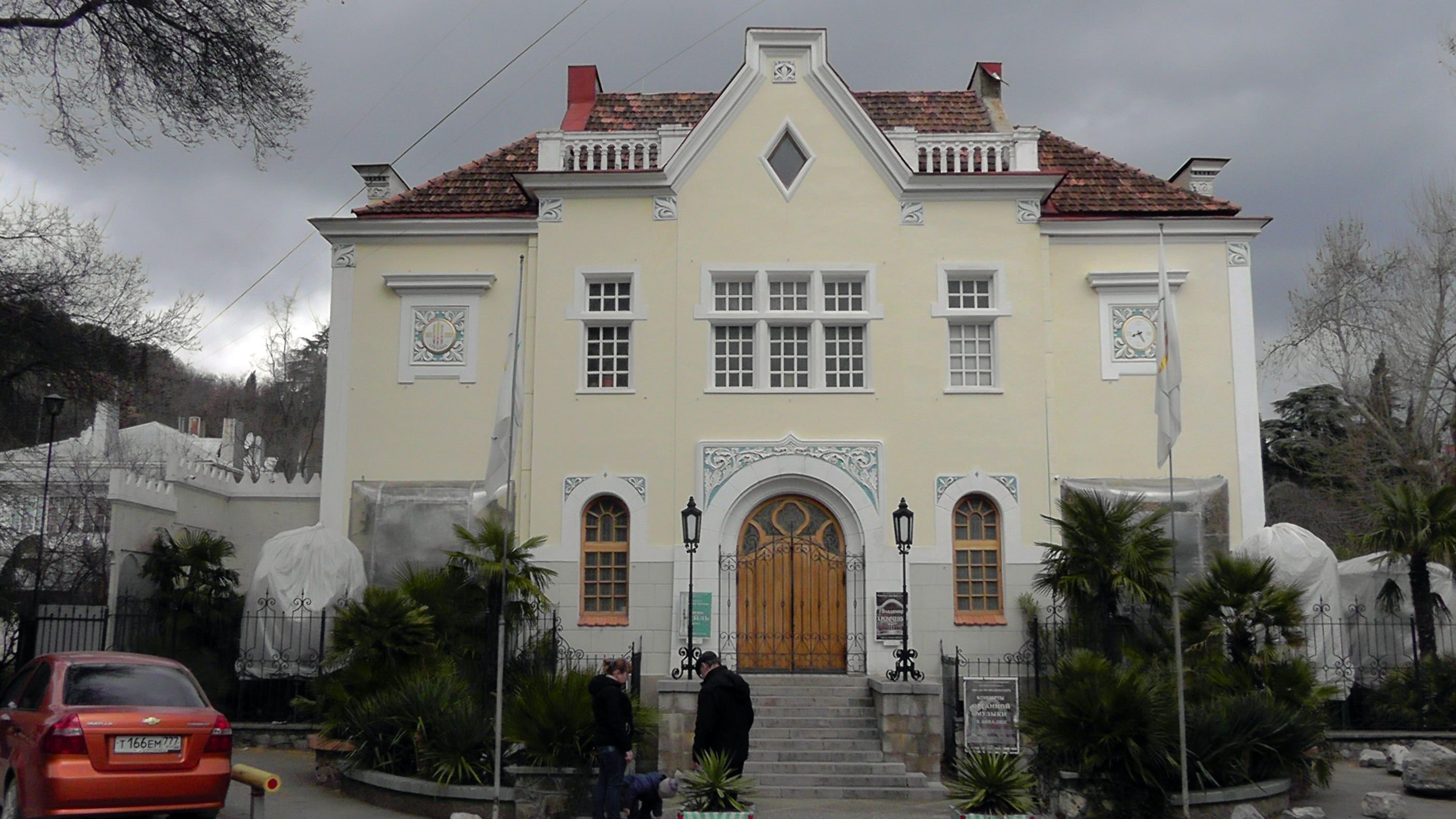 Електростанція, 1911 р., Лівадія, вул. Батурина, 4